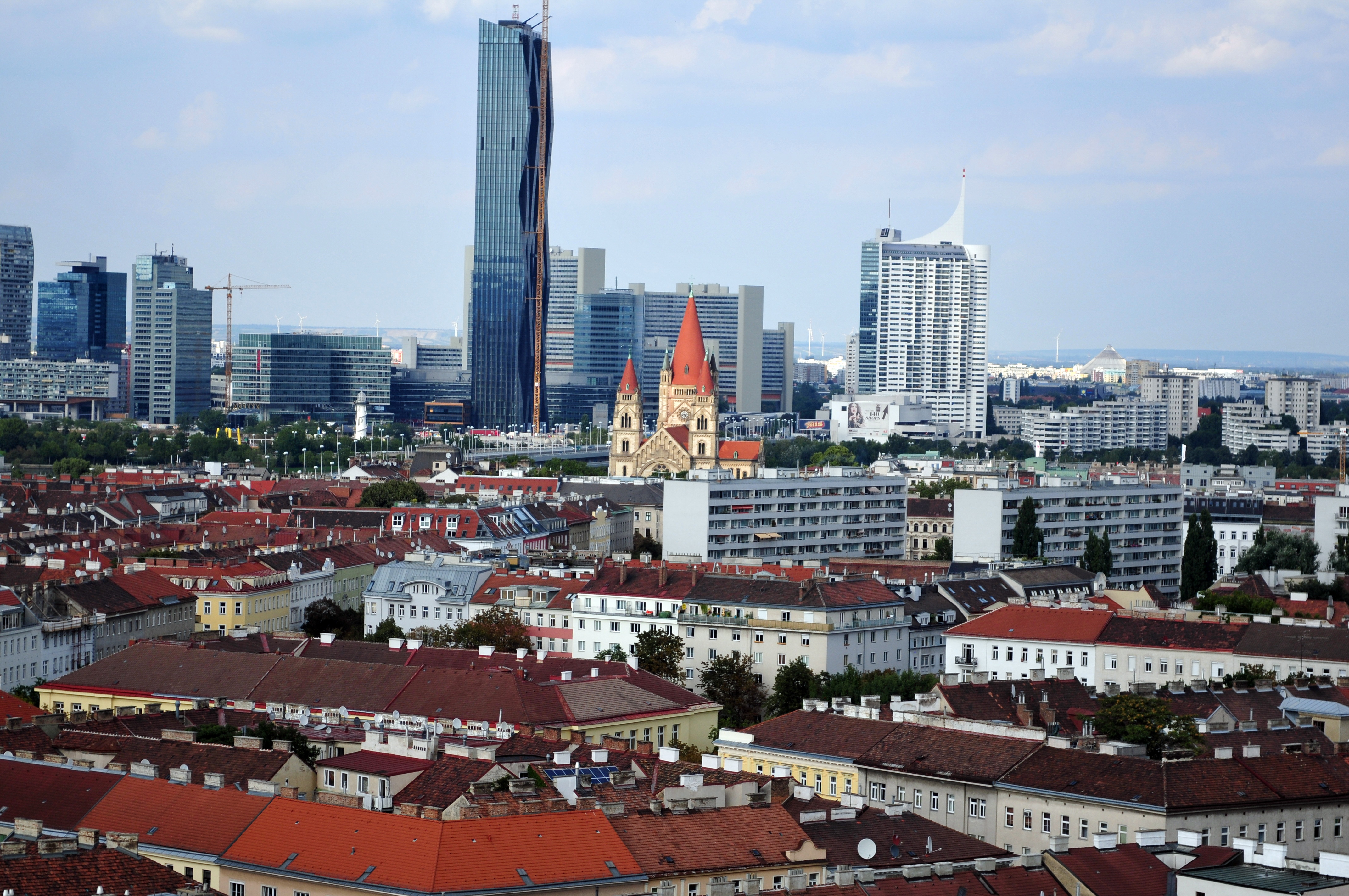 Treffen der Redaktion Essen und Trinken in Wien